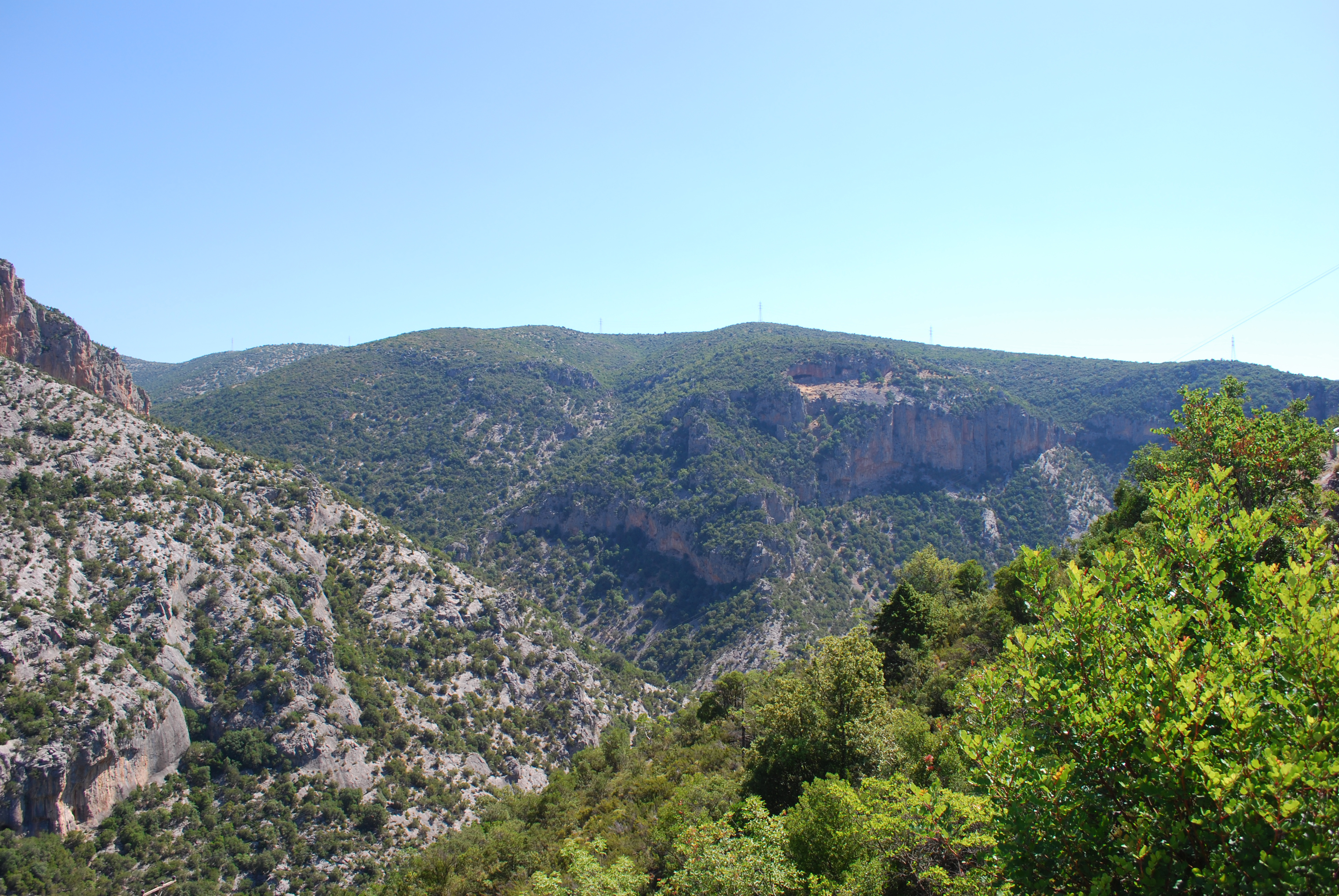 Vue du Parnonas.